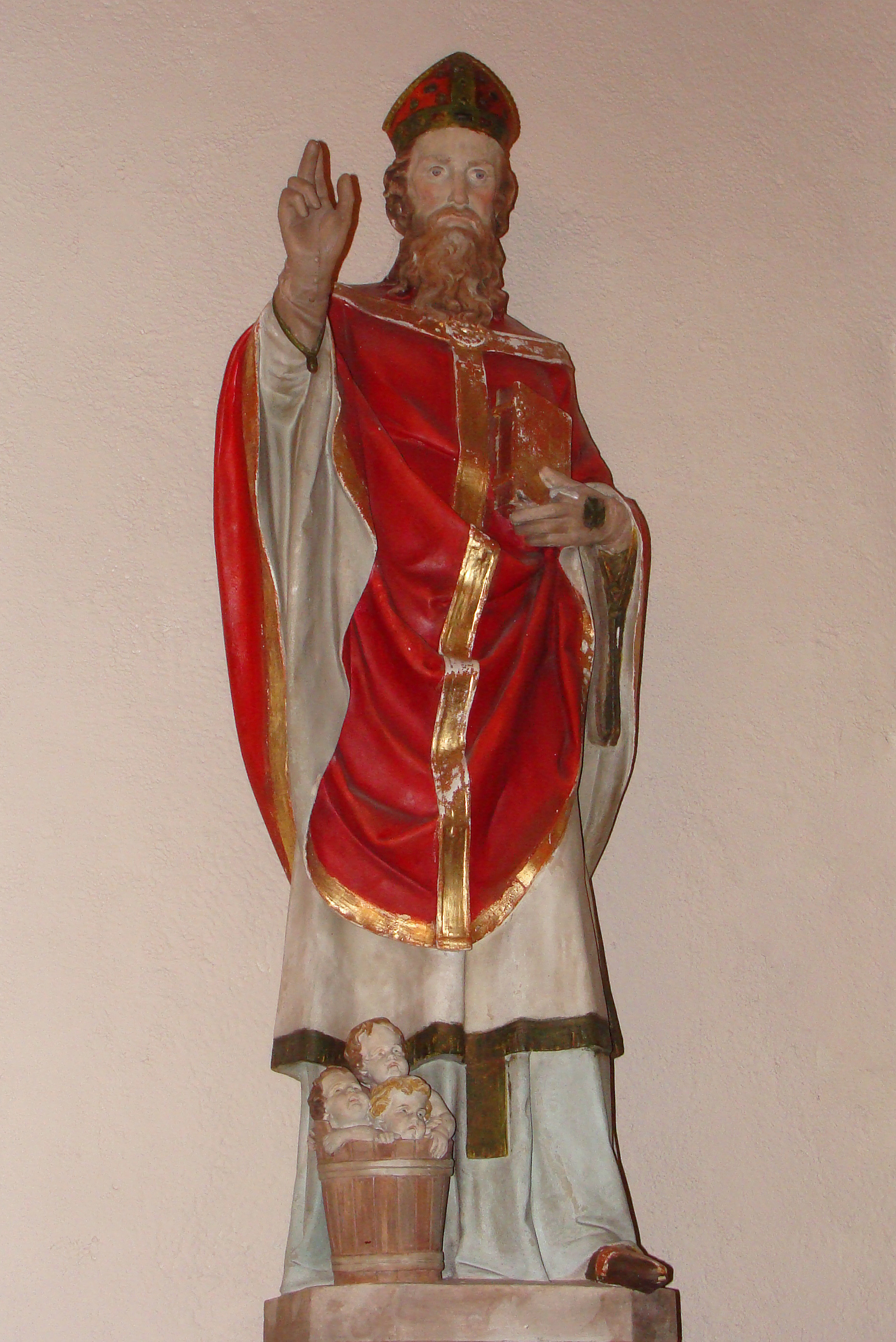 Statue de Saint Nicolas, église Saint-Nicolas de L'Hôpital (Moselle)